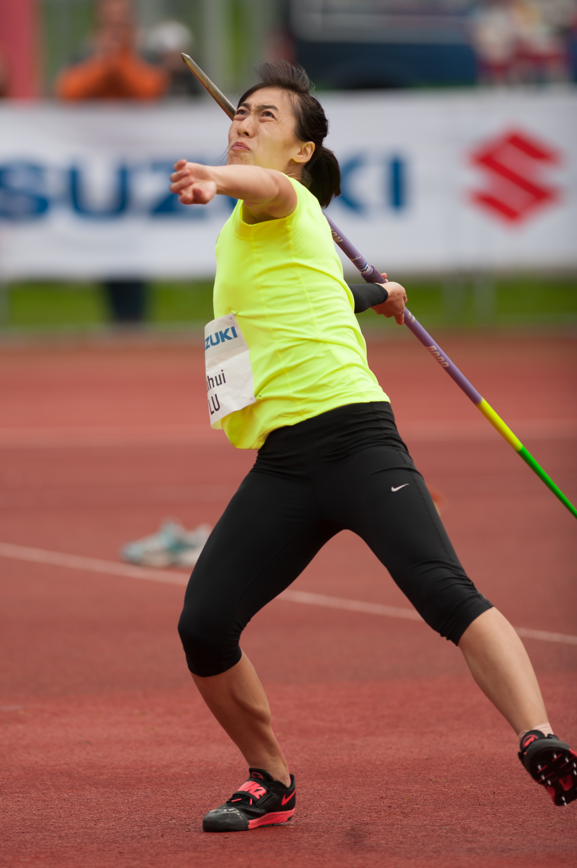 Salzburger Leichtathletik Gala am 27. Mai 2015: Huihui Lu